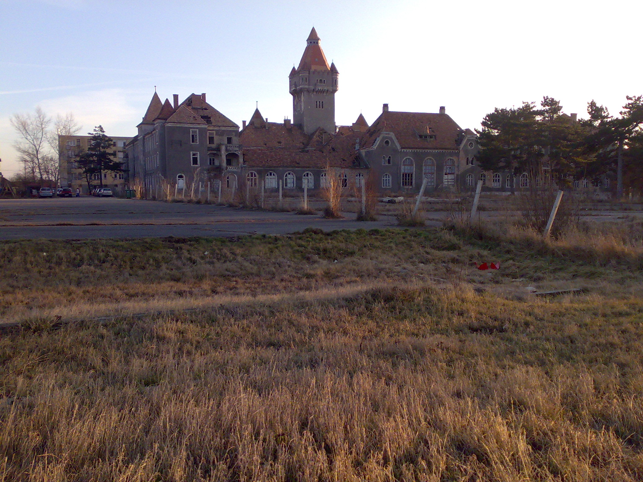 Hajmáskéri tüzérlaktanya - kastély